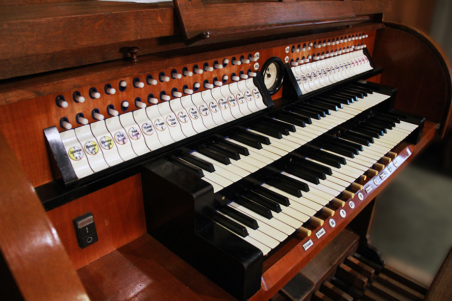 Detailansicht des originalen Spieltisches der Strebel-Orgel von 1911 in der evang. Stadtkirche Lauscha.